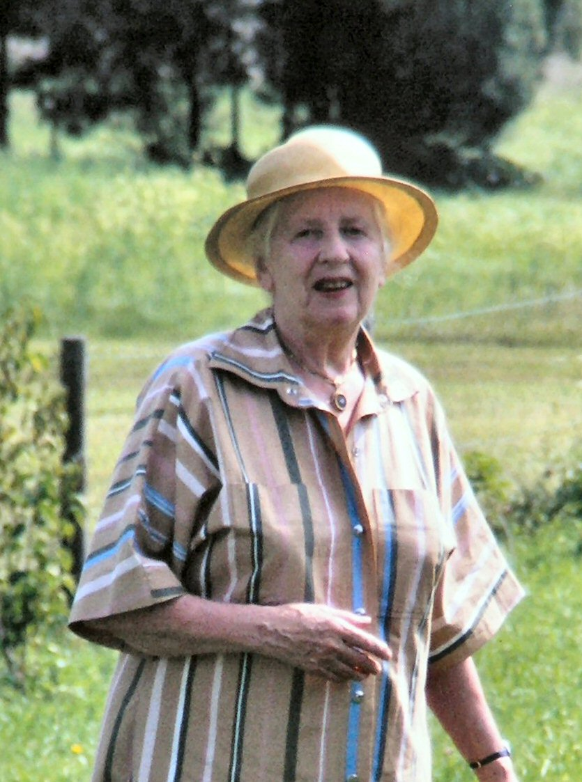 Marie-Louise von Motesiczky in Altaussee (Österreich) 1988